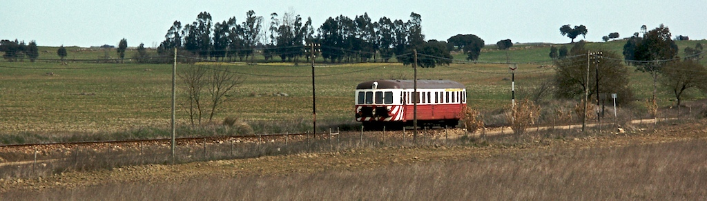 Tipo: Comboio Regional 6710 [Évora - Casa Branca] Local: Tojal [Linha de Évora, PK 102] Data e hora: 3 de Março de 2005 [13h27] Material: Automotora 01xx [Unidade Simples Diesel - Nohab]